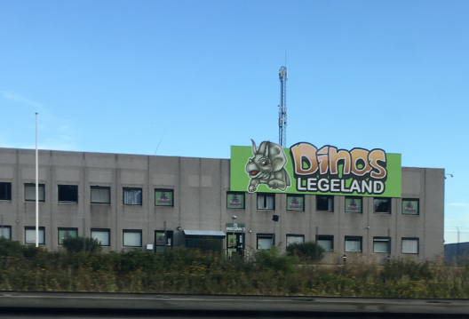 Dinos Legeland i Ishøj set fra motorvejen